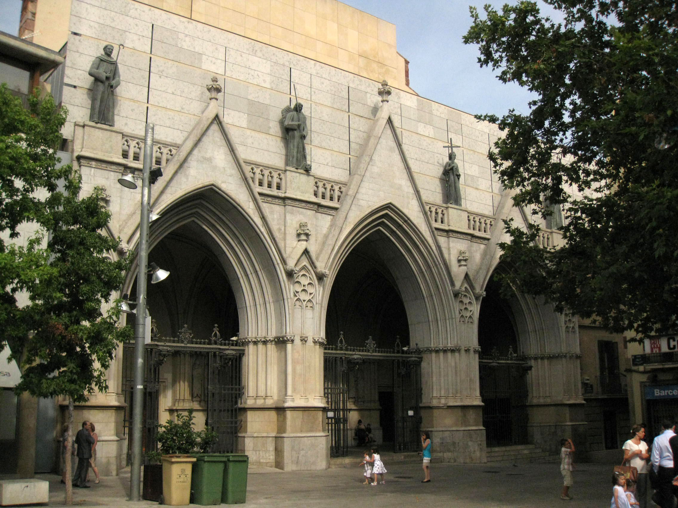 Catedral del Sant Esperit, a Terrassa; façana.